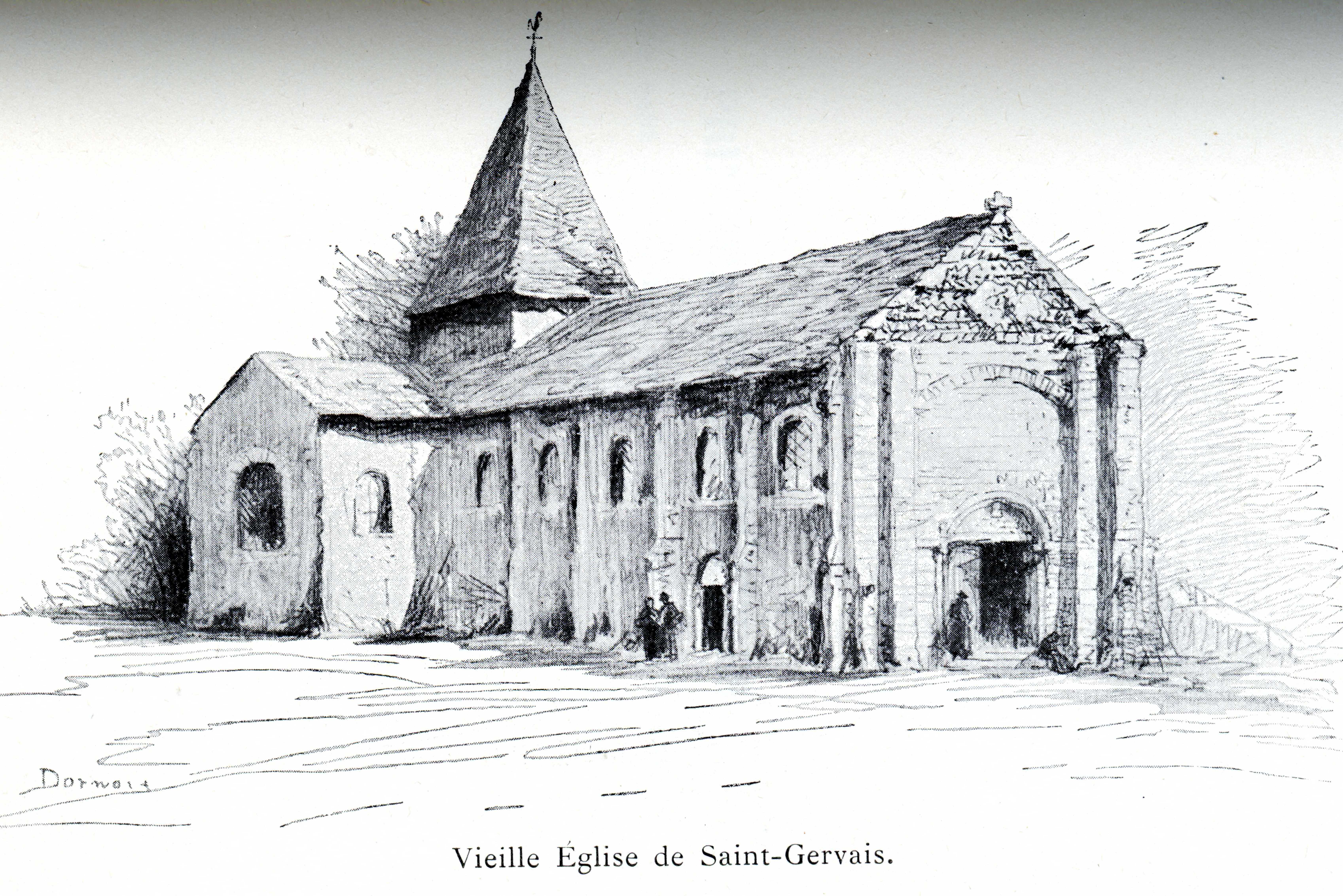 Eglise St Gervais de Briouze avant démolition du XIXe siècle